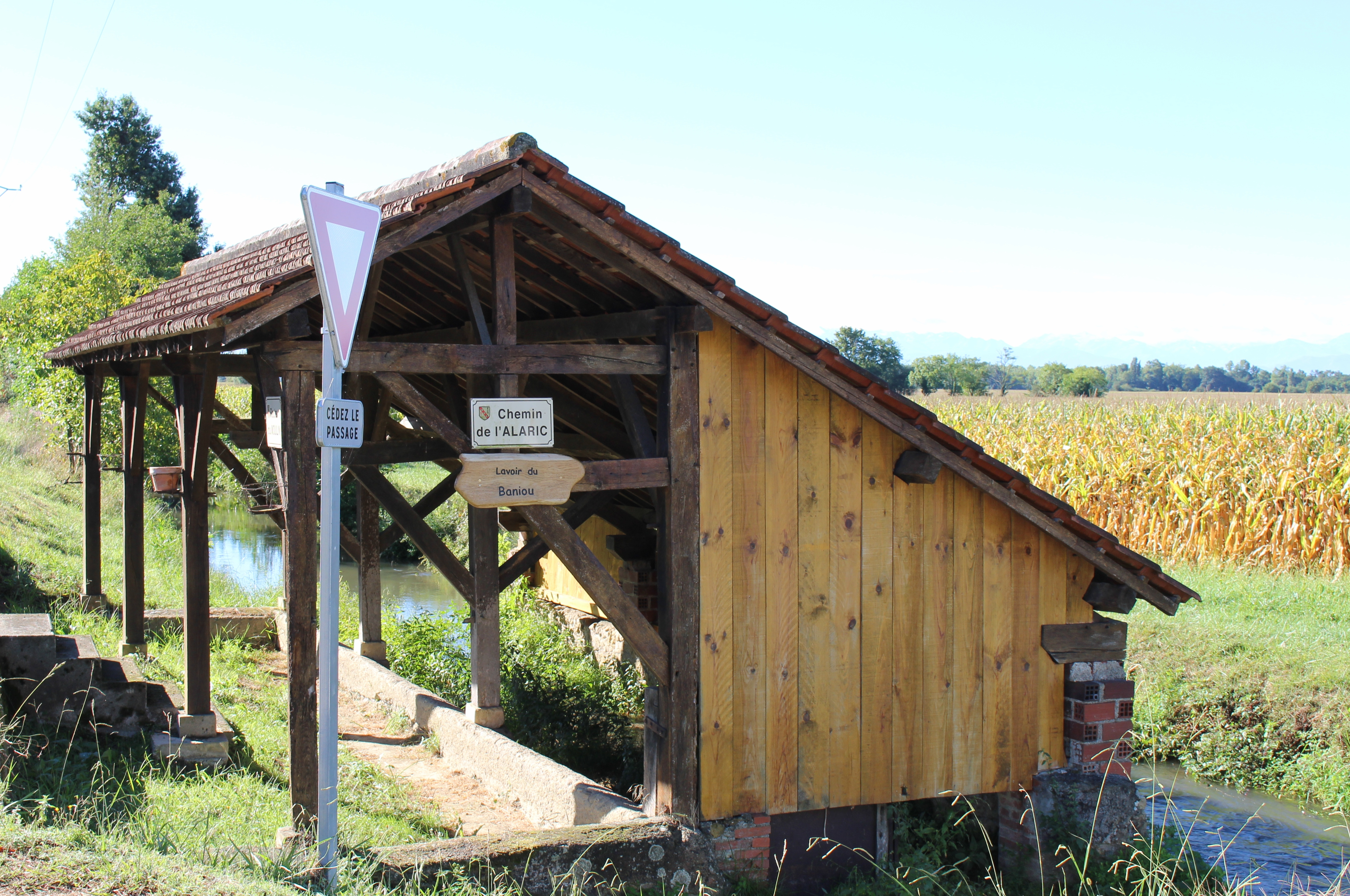 Lavoir de Sauveterre (du Baniou) (Hautes-Pyrénées)